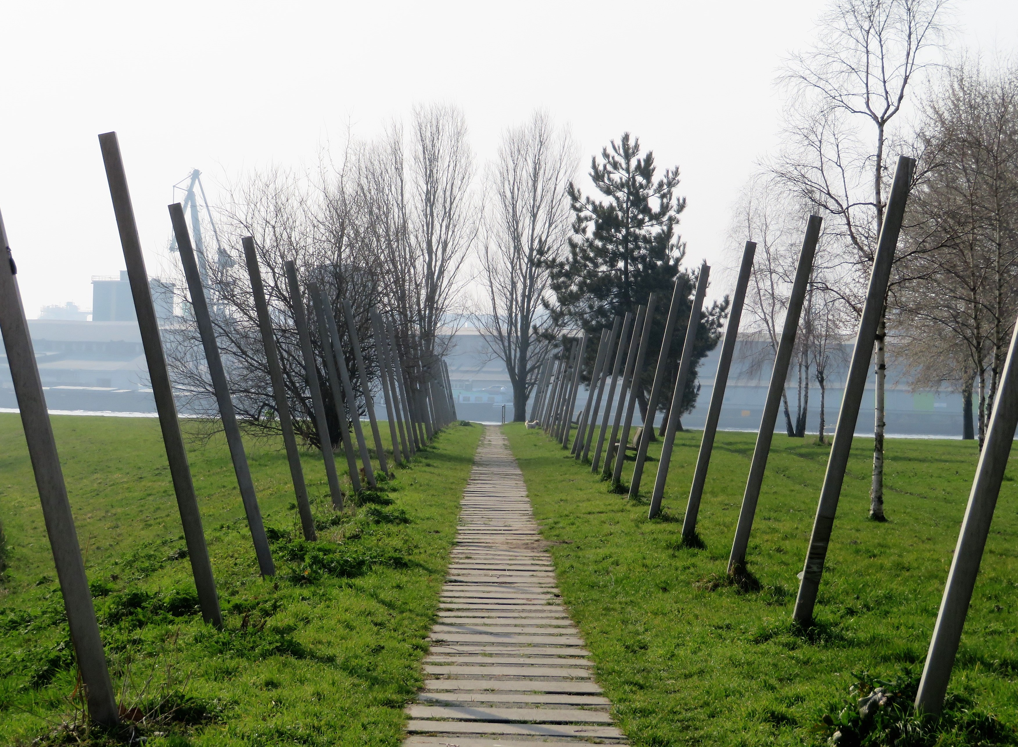 Keerkringpark, Amsterdam-Noord. Architect Saline Verhoeven.